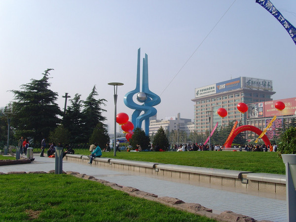 山东省济南市泉城广场